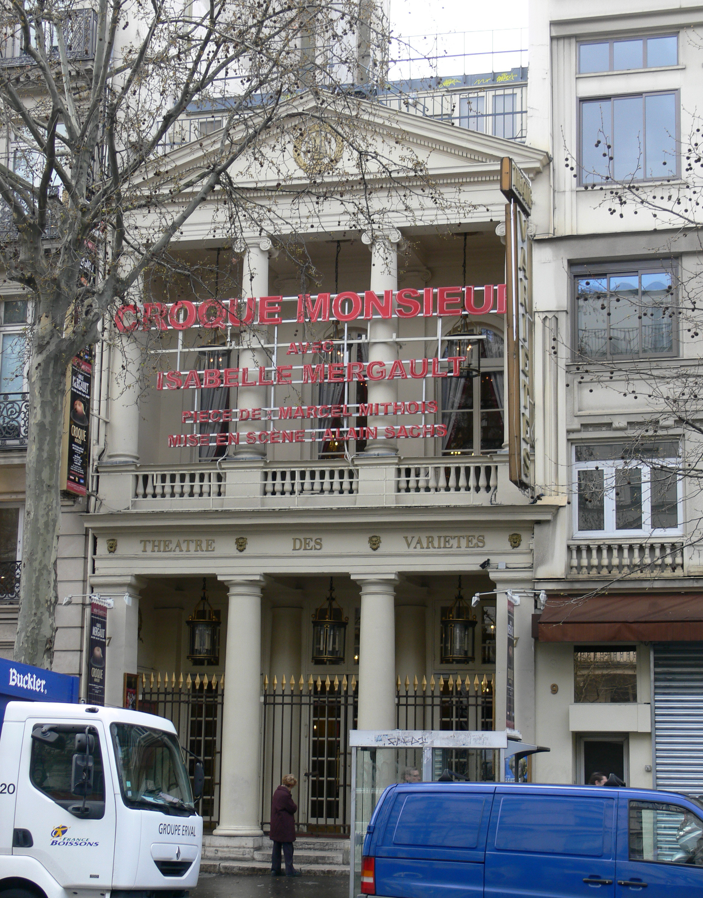 Théâtre des Variétés, boulevard Montmartre, Paris, France